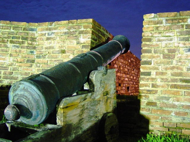 Visão interna da Fortaleza de Macapá.